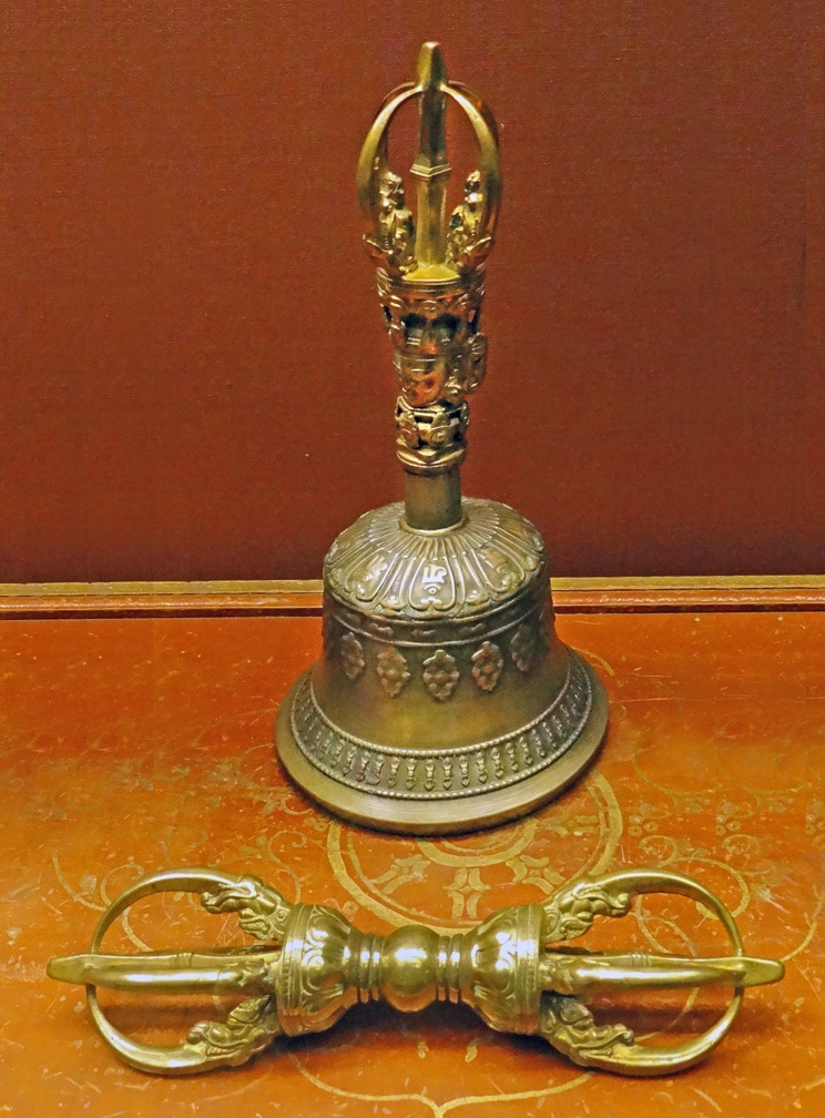 Objets essentiels de la symbolique bouddhiste : la Cloche (bell, ghanta, drilbou ou dilbu) et le Vajra ou Diamant (thunderbolt, dorjé ou dorjey) La cloche symbolise la connaissance de la vacuité (pôle féminin), elle est associée au Vajra qui est le symbole de la Compassion (pôle masculin) Tibet XVIIIè siècle Don H.G. Beasley, Esq British Museum (Londres)